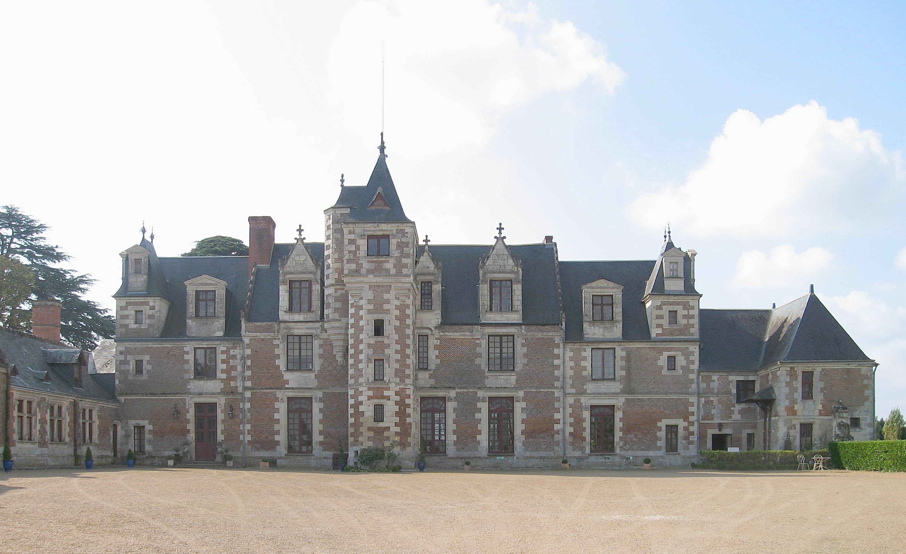 Hauptgebäude des Schlosses Jallanges in Vernou-sur-Brenne